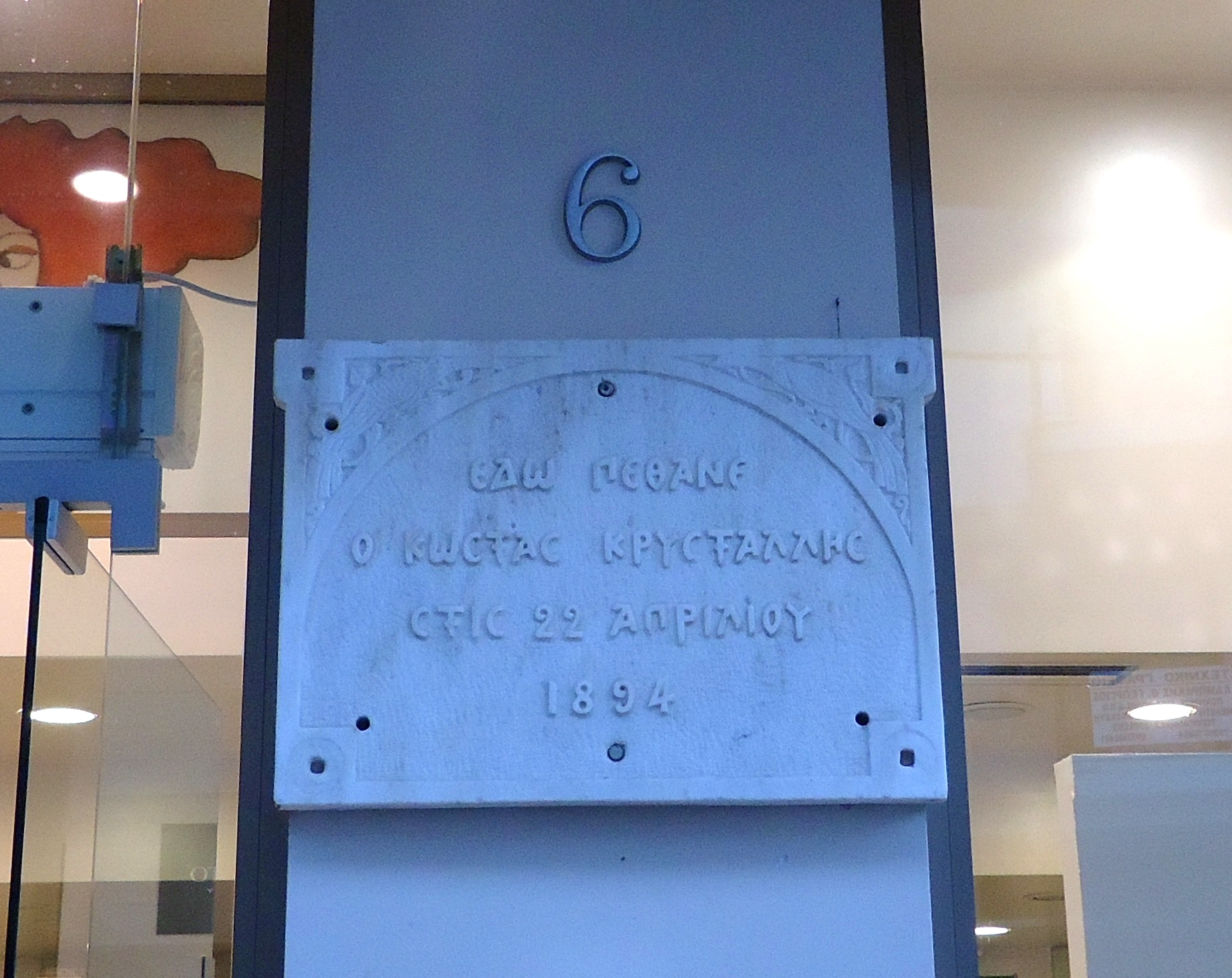 Επιγραφή στο σημείο όπου βρισκόταν το σπίτι του ποιητή Κώστα Κρυστάλλη στην οδό Καραπάνου.